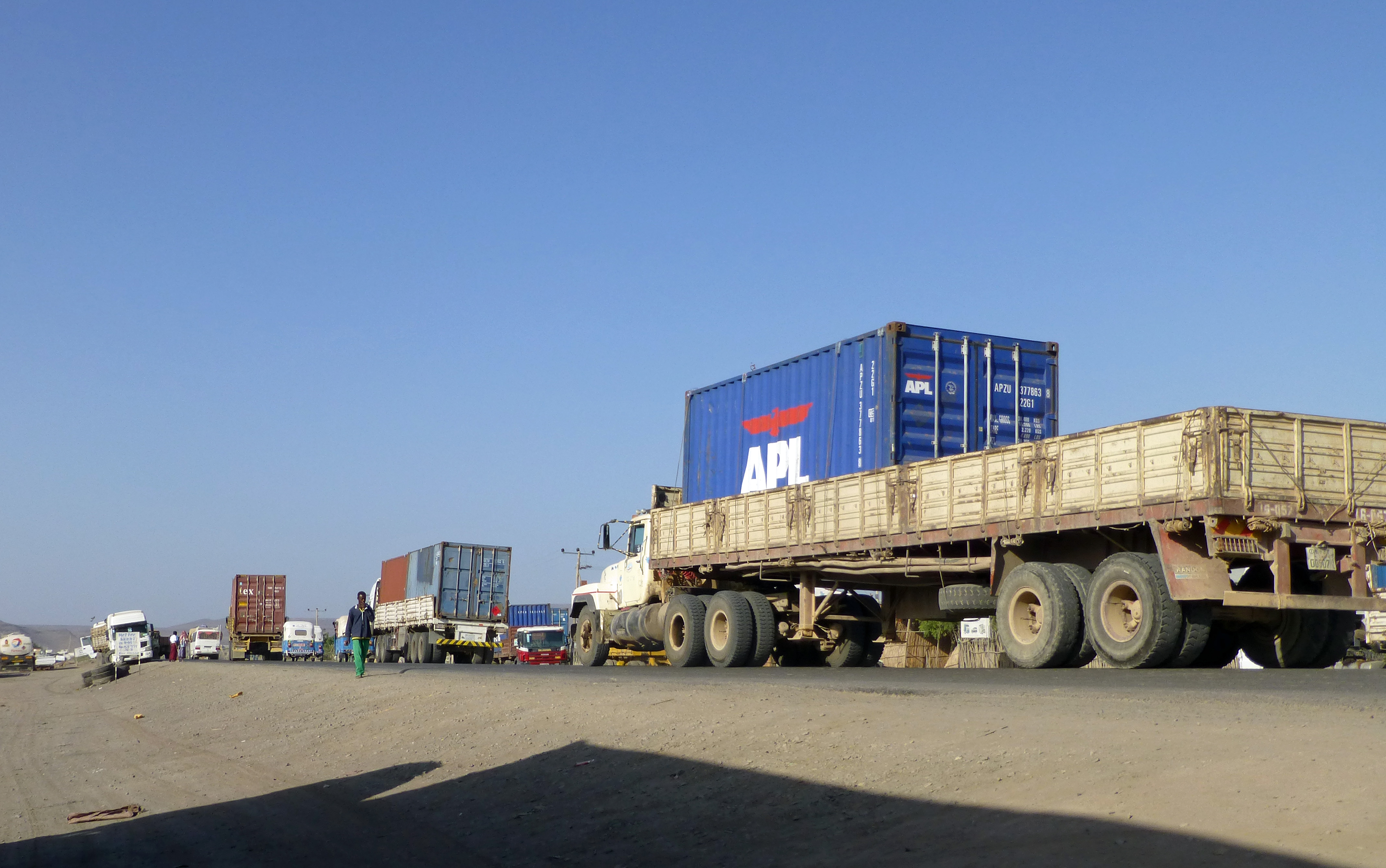 Localité d'Awash (région Afar, Ethiopie) : trafic routier intense